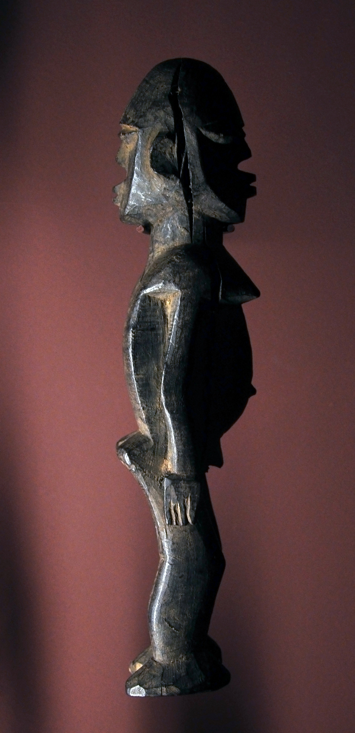 Statuette, culture Lobi, 1920-1950, représentant un esprit rencontré dans un rêve; ici un Bateba tibala ( "personne extraordinaire", un être multiple ); ces statuettes sont déposées sur des autels personnels ou familiaux pour obtenir protection et prospérité . Musée africain à Lyon.